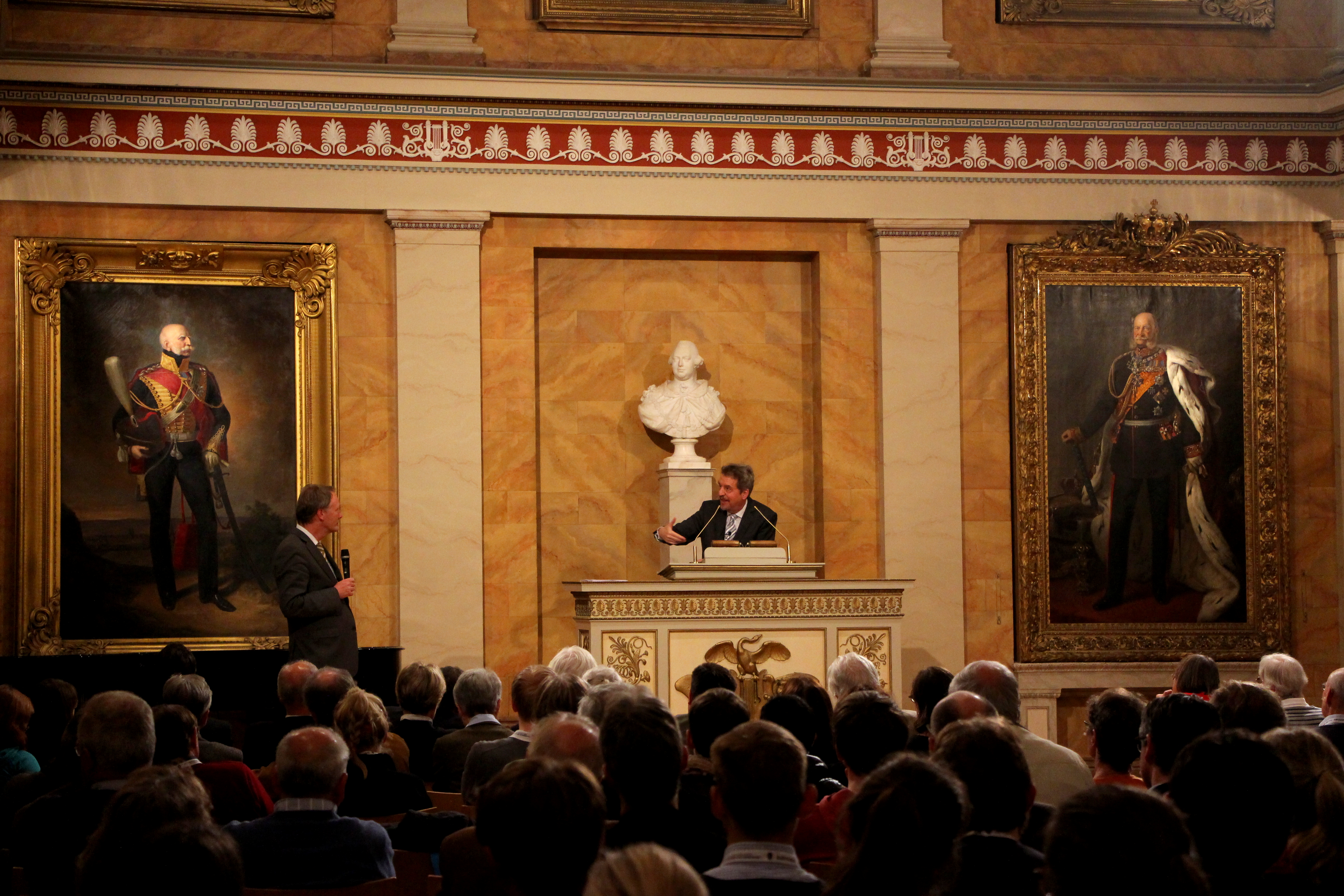 Historikertag 2014 in Göttingen.